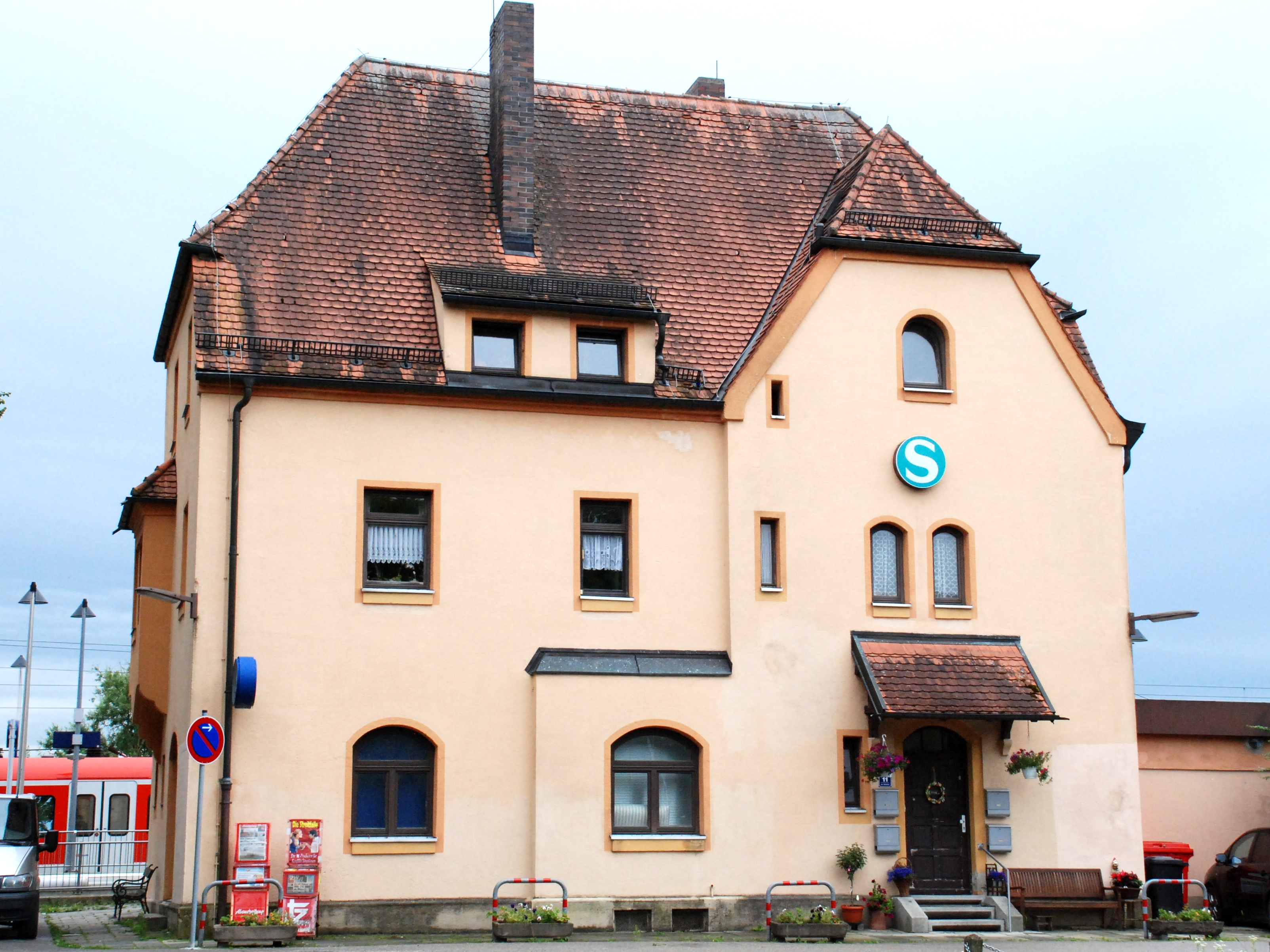 Bahnhof von Aying, Landkreis München, Bezirk Oberbayern, Bayern. Erbaut um 1902.